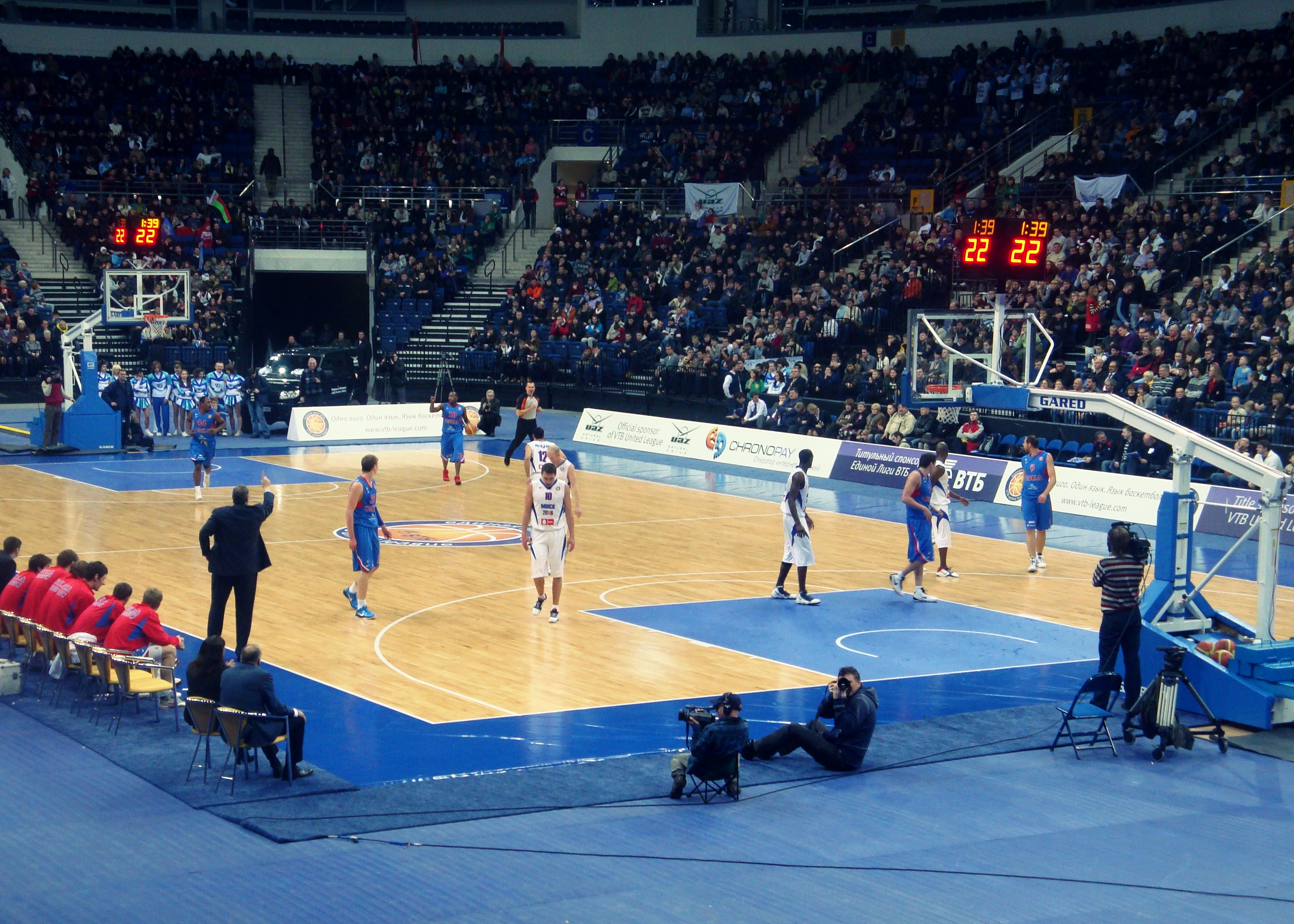 Баскетбольный матч ЦСКА - Минск 2006